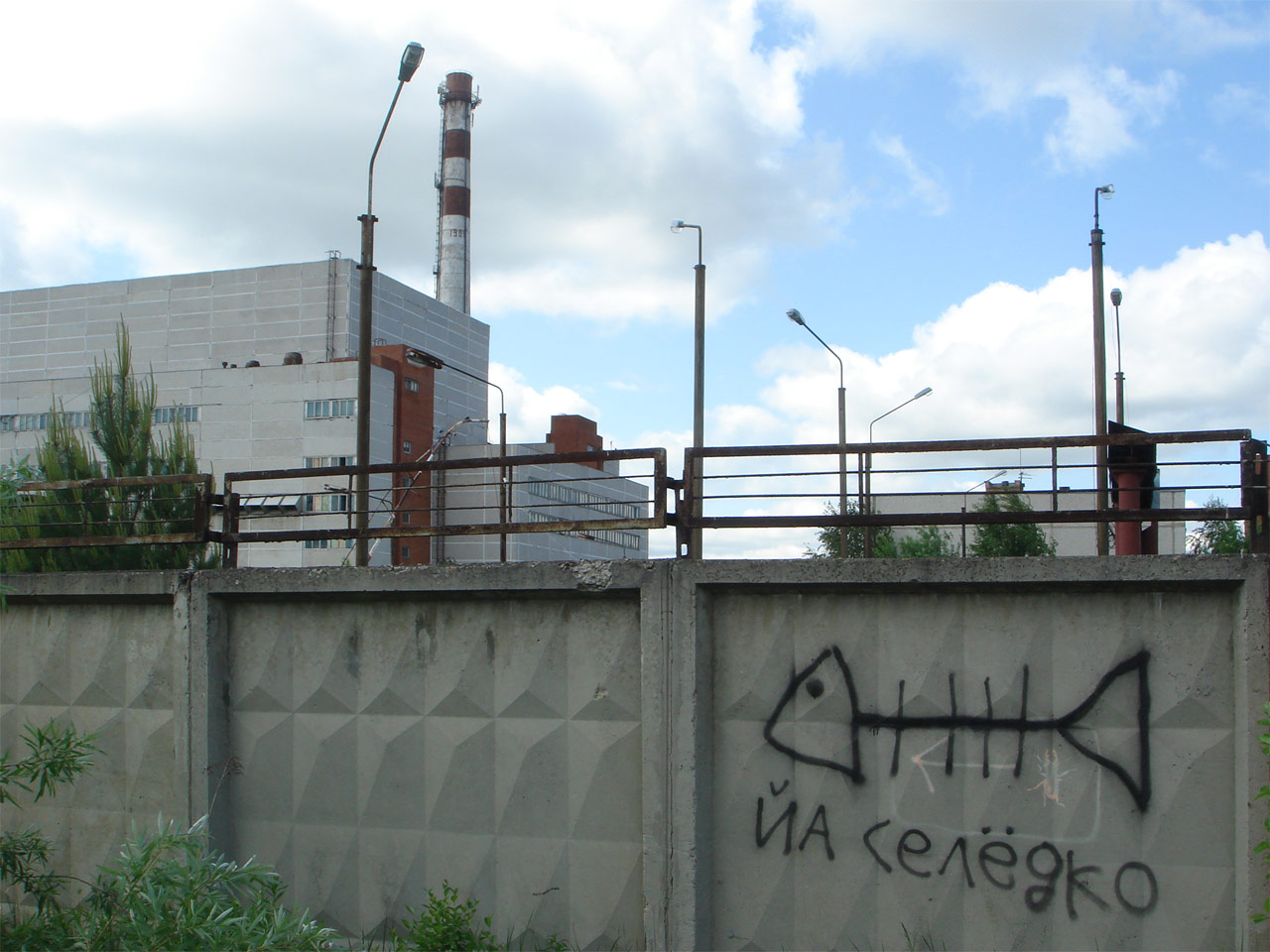 Граффити на заборе ГАСТ.